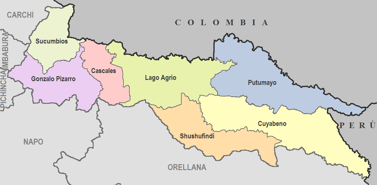 Cantones de Sucumbíos